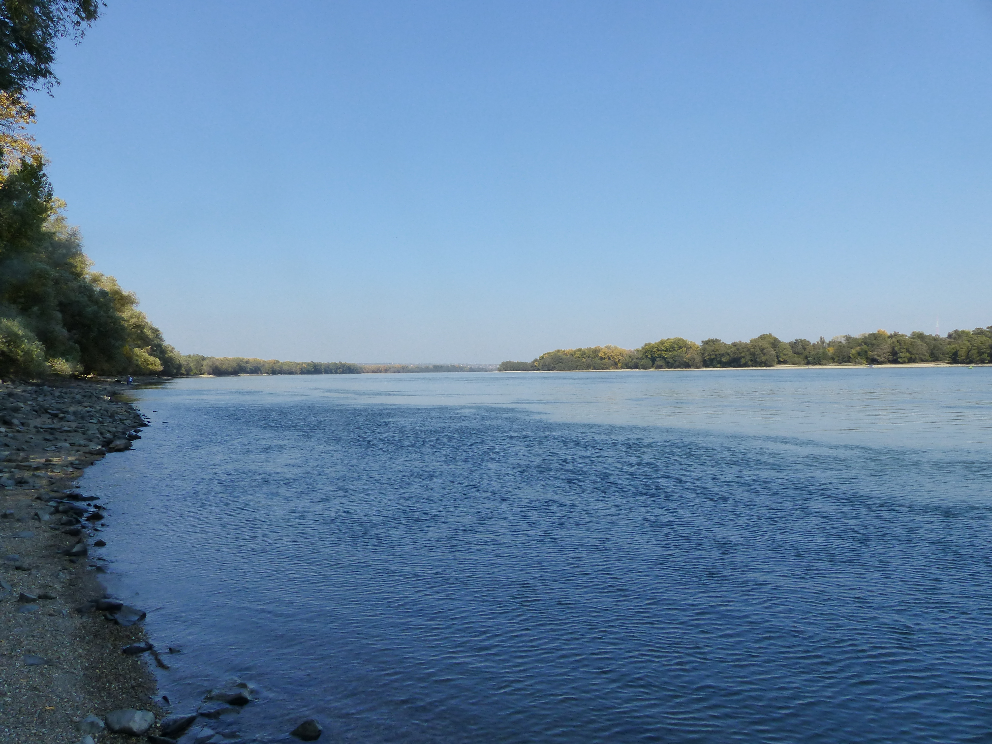 Beliczay-sziget 2018. október 11-én. Érd.